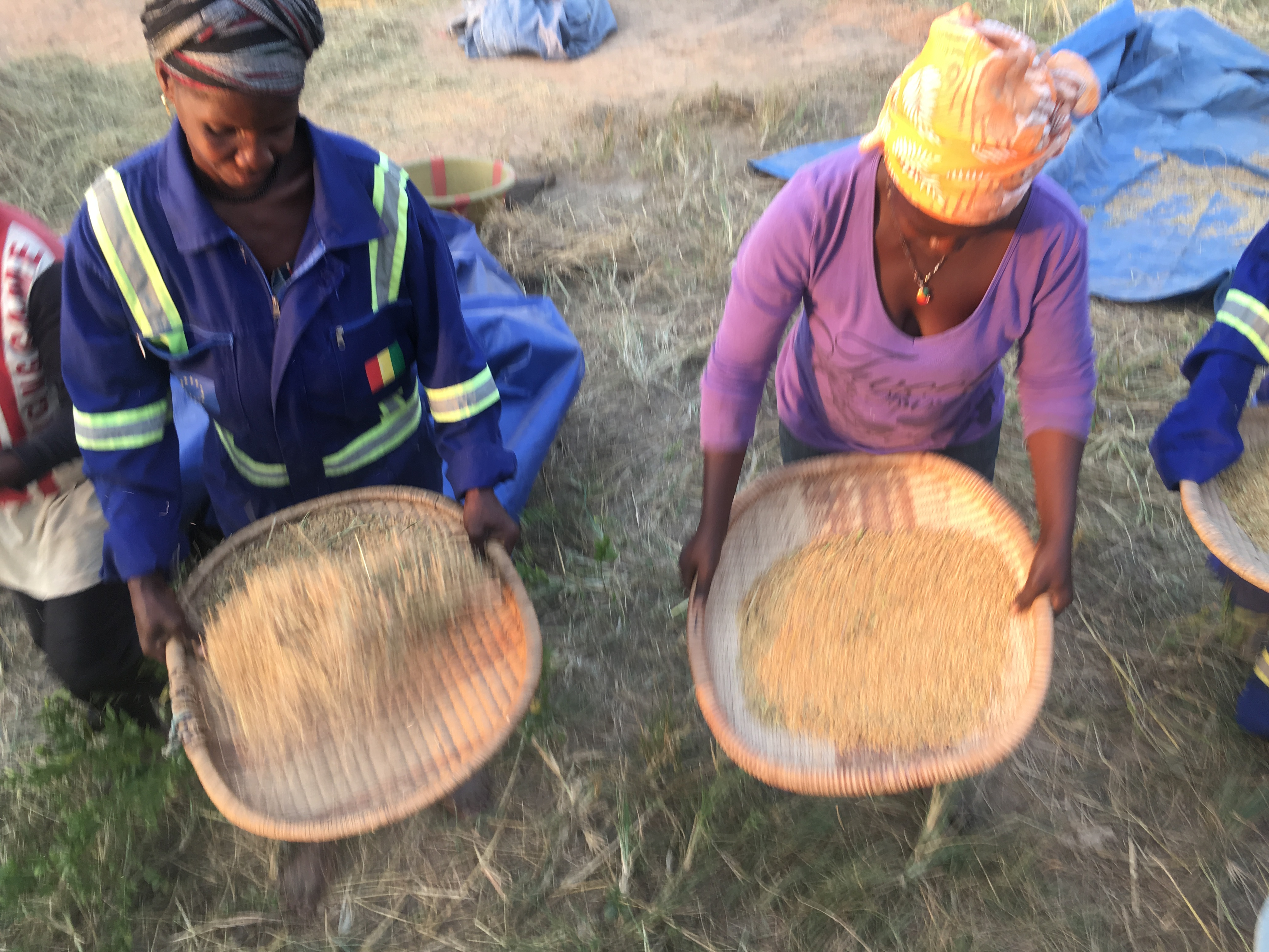 Reisernte